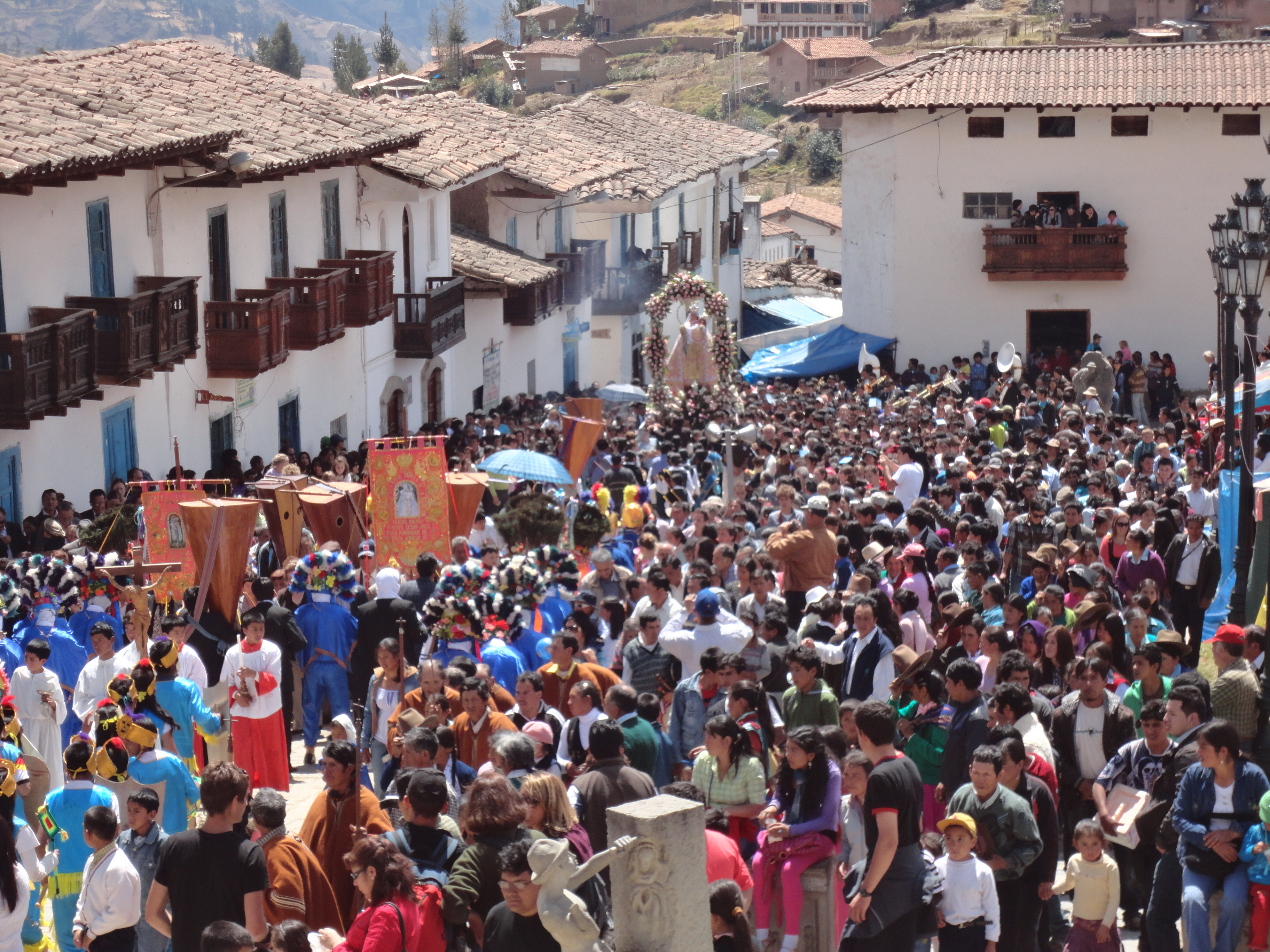 Procesión de la Virgen de la Asunción en Chacas, Perú